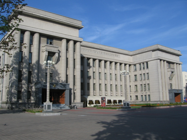 Дом офицеров, Минск